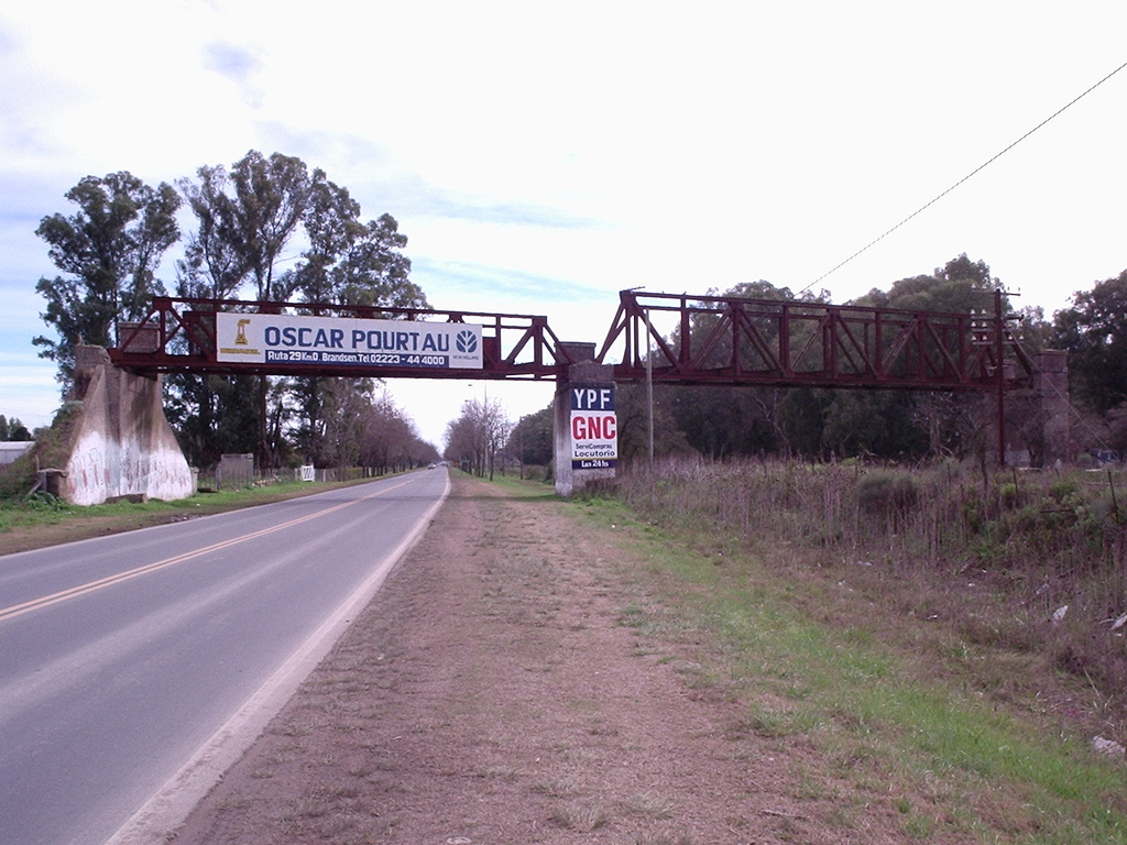 Puente que perteneció al ferrocarril provincial de Buenos Aires, este cruza la ruta provincial numero 29 y las vias del ferrocarril Roca cerca de la ciudad de Brandsen.